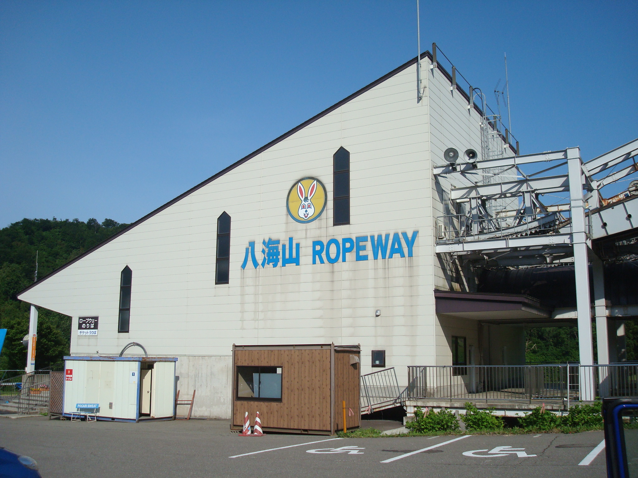 新潟県南魚沼市にある八海山ロープウェーの山麓駅。